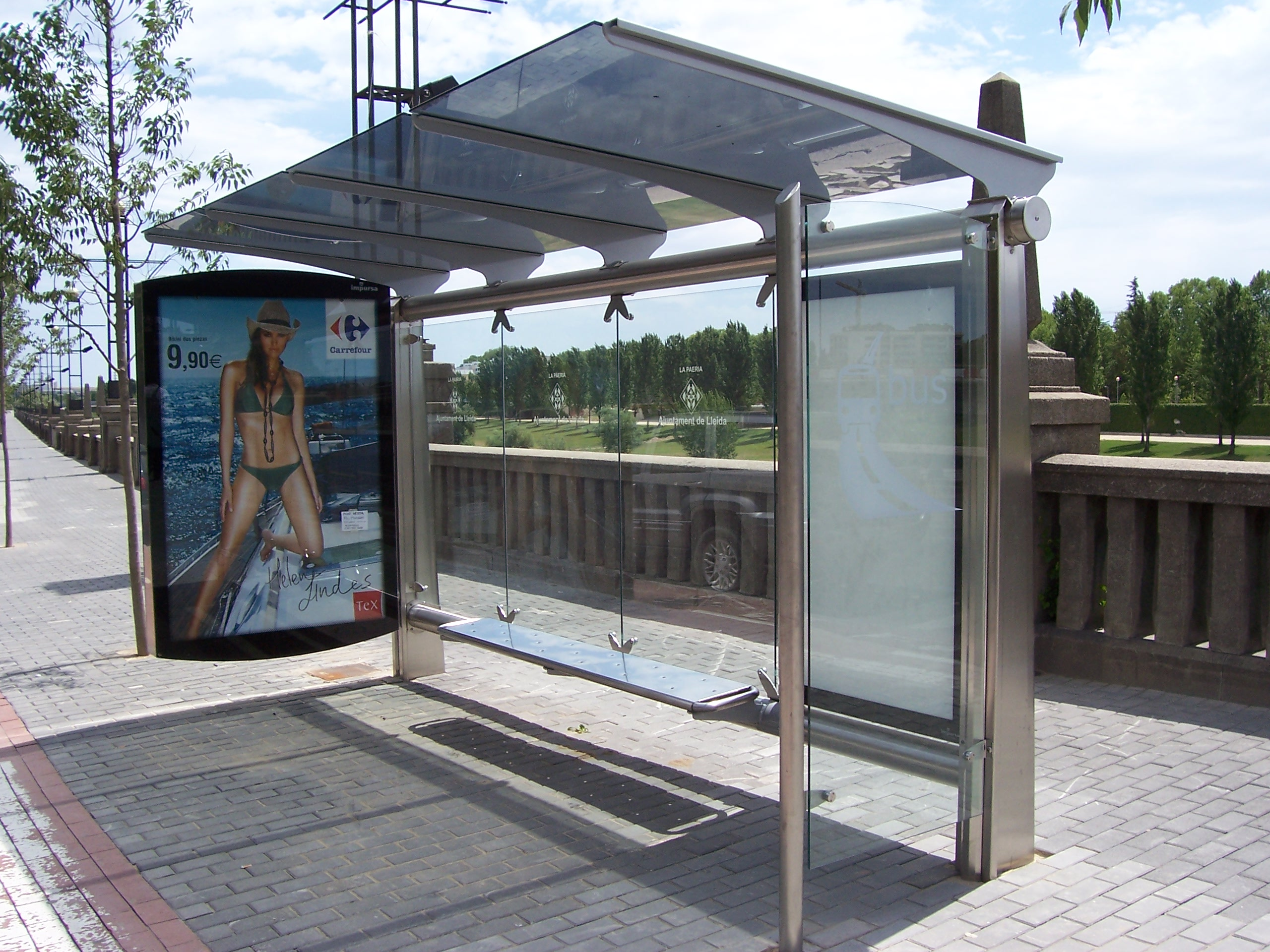 Marquesina dels Autobusos de Lleida.